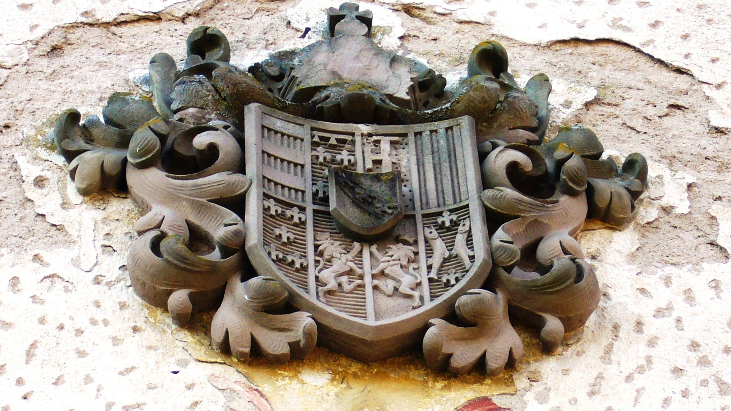 Armoiries de Lorraine se trouvant au-dessus du porche du château de Thanvillé.